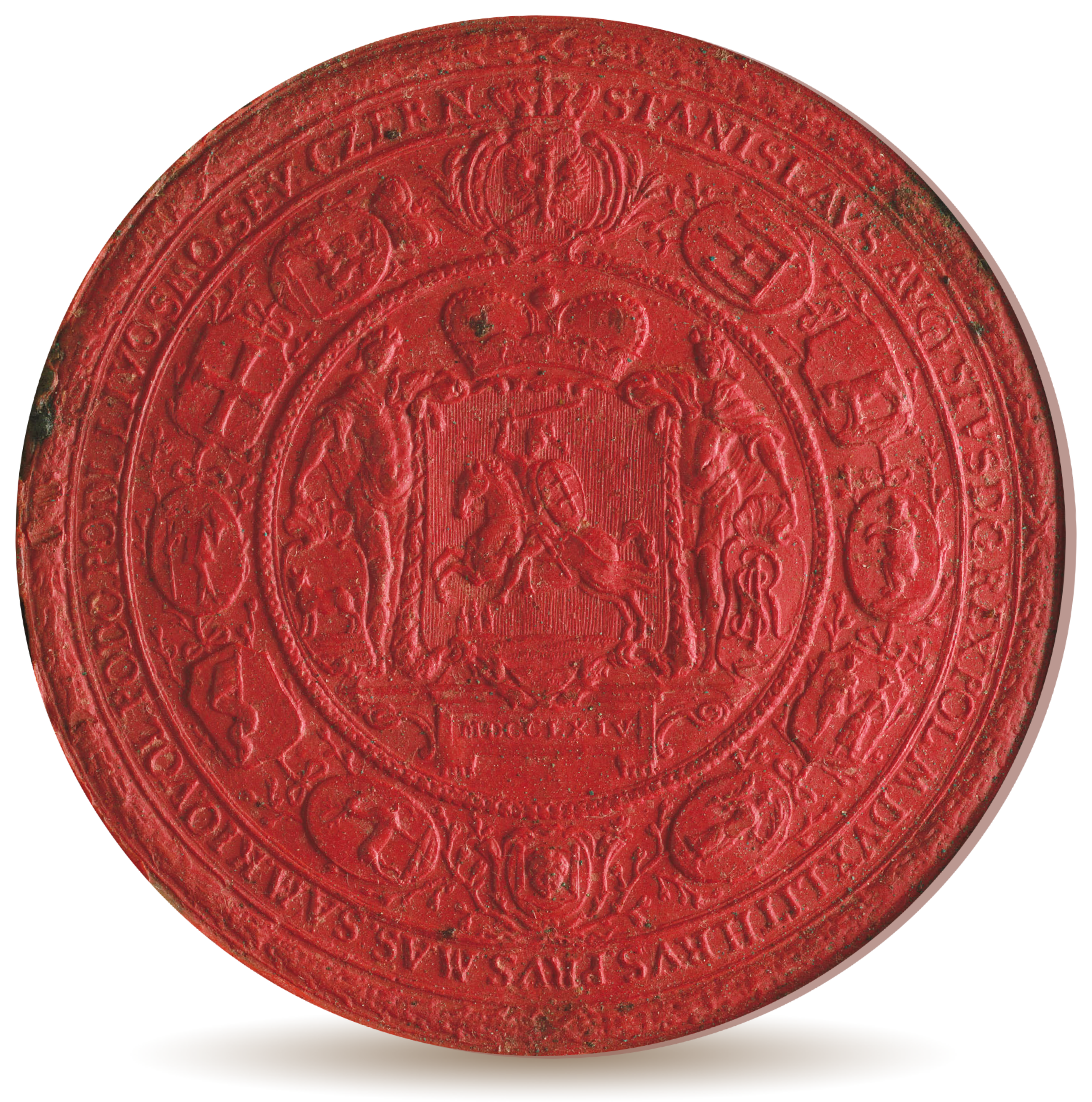 Большая литовская печать Станислава Августа 1764—1795 годов. По центру — герб Великого княжества Литовского. Вверху — герб Королевства Польского. Справа: родовой герб Гедиминовичей. Далее по кругу гербы воеводств: Киевского (идущий медведь), Жемайтского (вздыбленный медведь), Подляшского (две особы), Новогрудского (архангел Михаил), Витебского (Спас), Полоцкого (олень), Смоленского (хоругвь), Трокского (воин с алебардой), Волынского (геральдический крест), Виленского (Погоня).